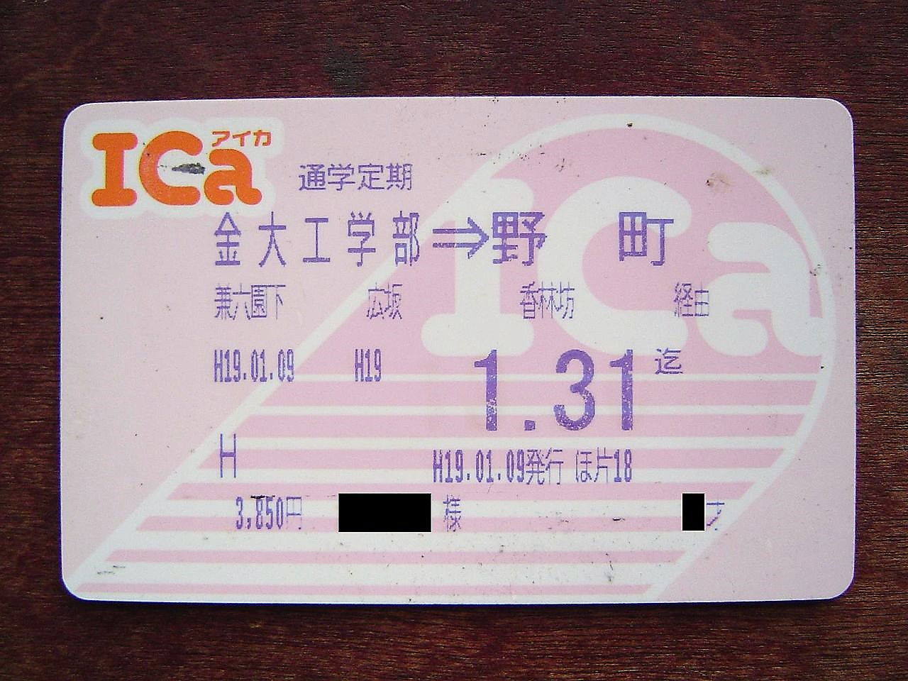 明るさを調整